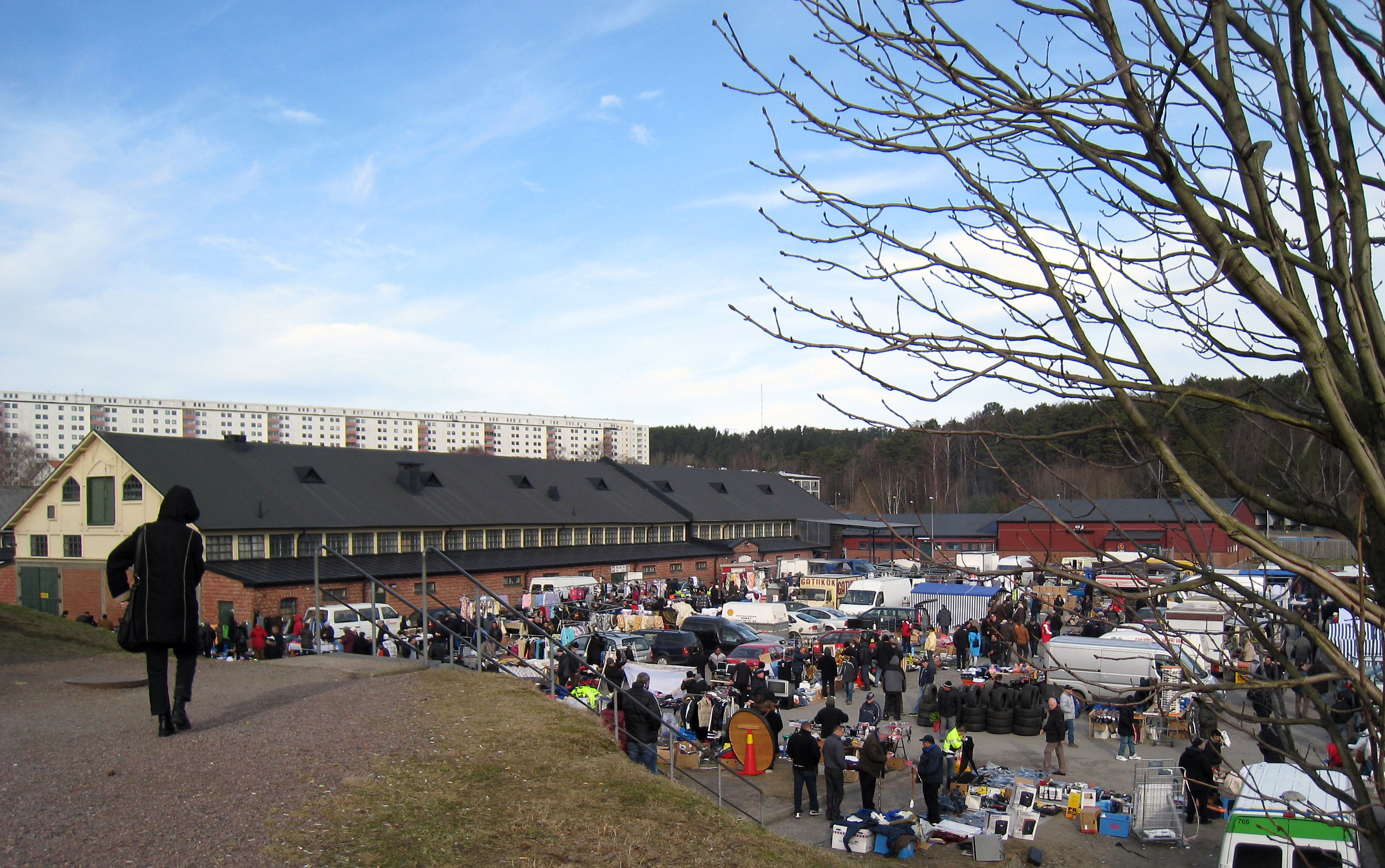 Kvibergs marknad i Östra Göteborg